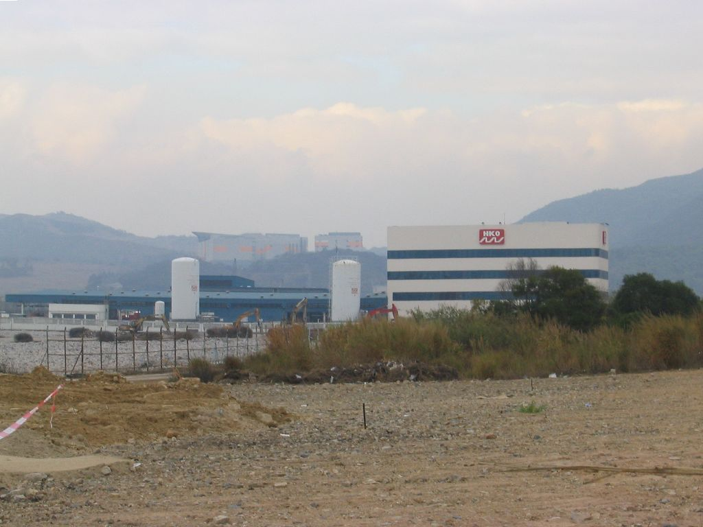 將軍澳工業邨-香港氧氣新廠 Hong Kong Oxygen Acetylene Ltd, Tseung Kwan O Industrial Estate